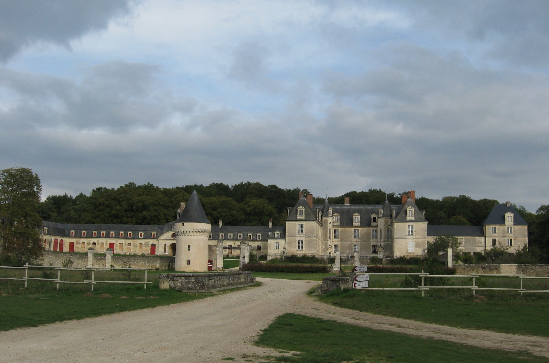 Vue d’ensemble. CMH 1945 .